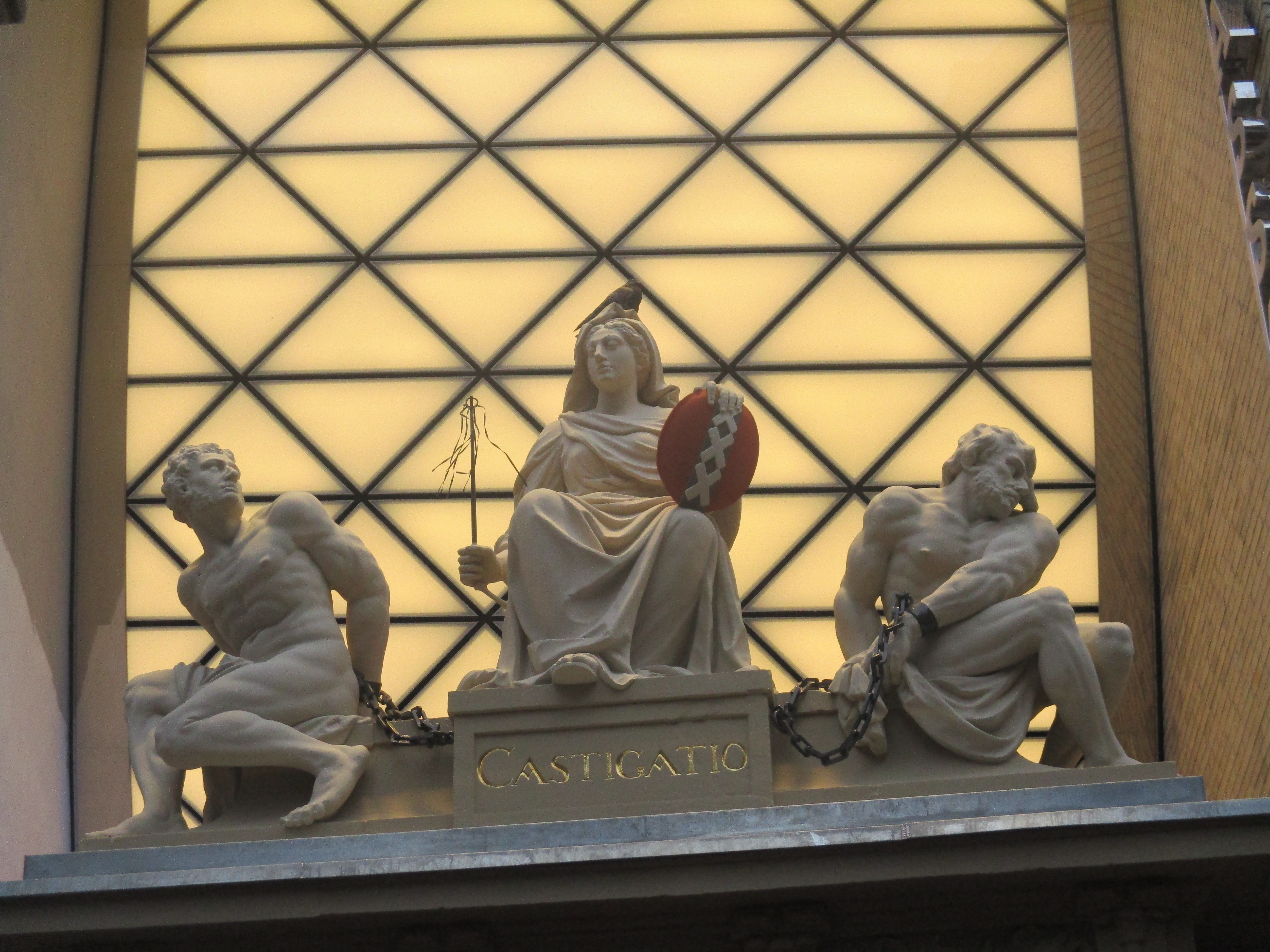 Groupe sculpté du XVIIe siècle représentant la Castigatio (châtiment), au-dessus de l'ancienne maison de correction Rasphuis donnant sur le Heiligweg d'Amsterdam. C'est aujourd'hui un centre commercial.